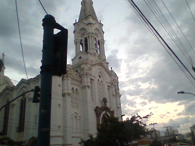 Foto de perfil da Basílica de Nossa Senhora Auxiliadora, Niterói